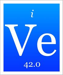 لوگوی چنل وریتازیوم